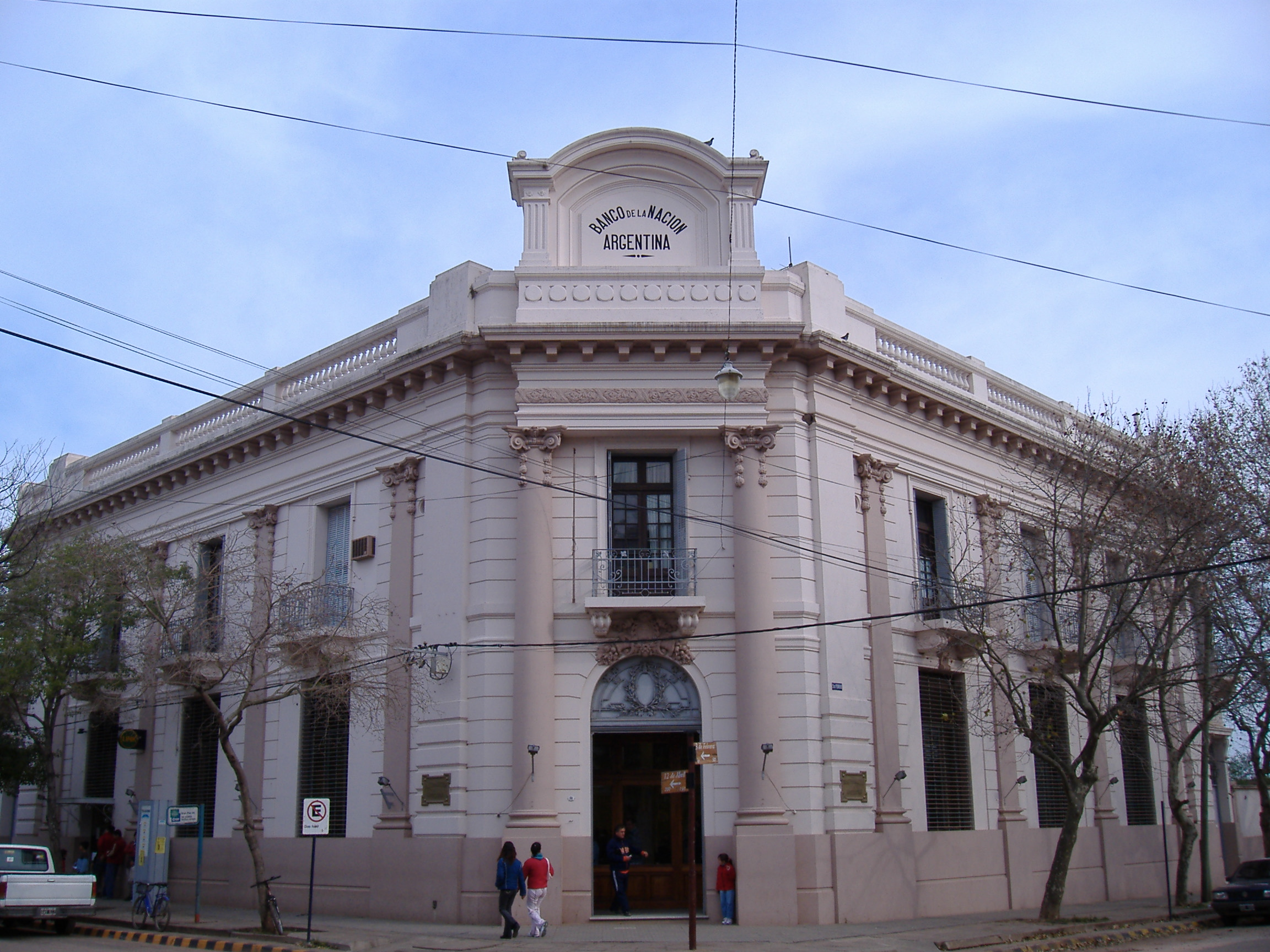 Branch of the Banco de la Nación Argentina in Colón, Entre Ríos, Argentina.